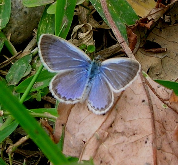 Zizina otis - lesser grass blue